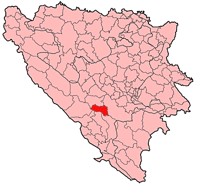 Prikaz općine Jablanica u Bosni i Hercegovini